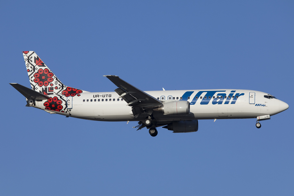 Antalya